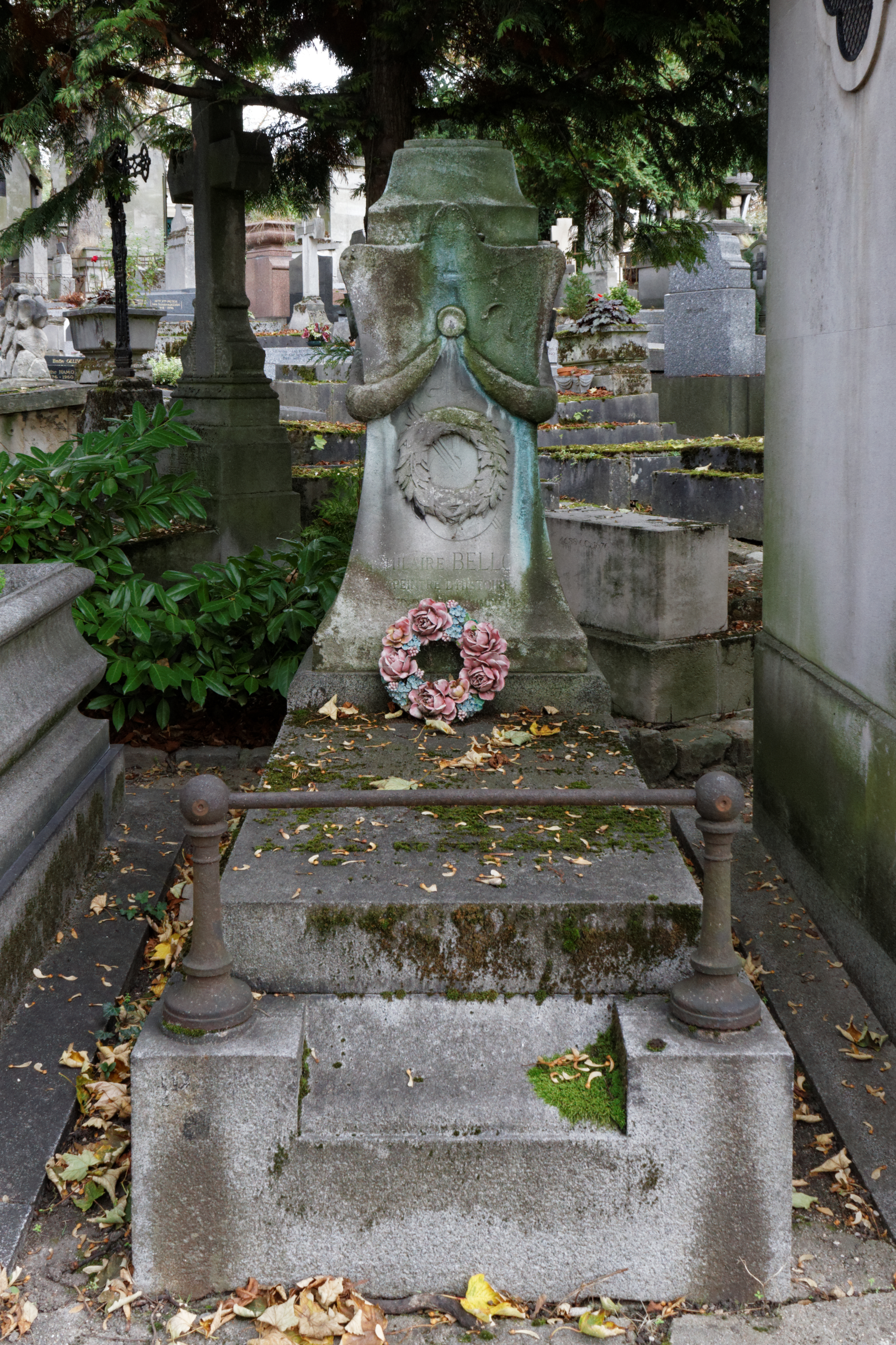 Tombe à l'origine ornée d'un buste en bronze signé P. Itasse, 1868.